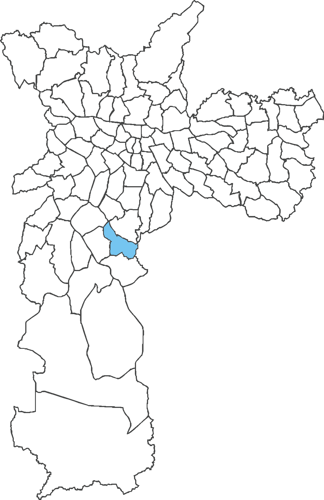 Localização do distrito de Cidade Ademar no município de São Paulo.